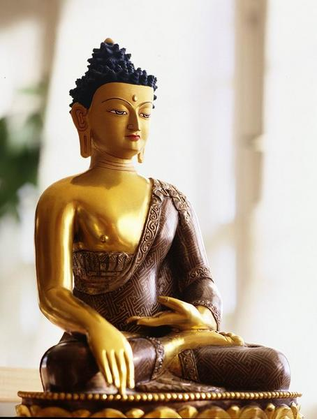 Budda Siakiamuni